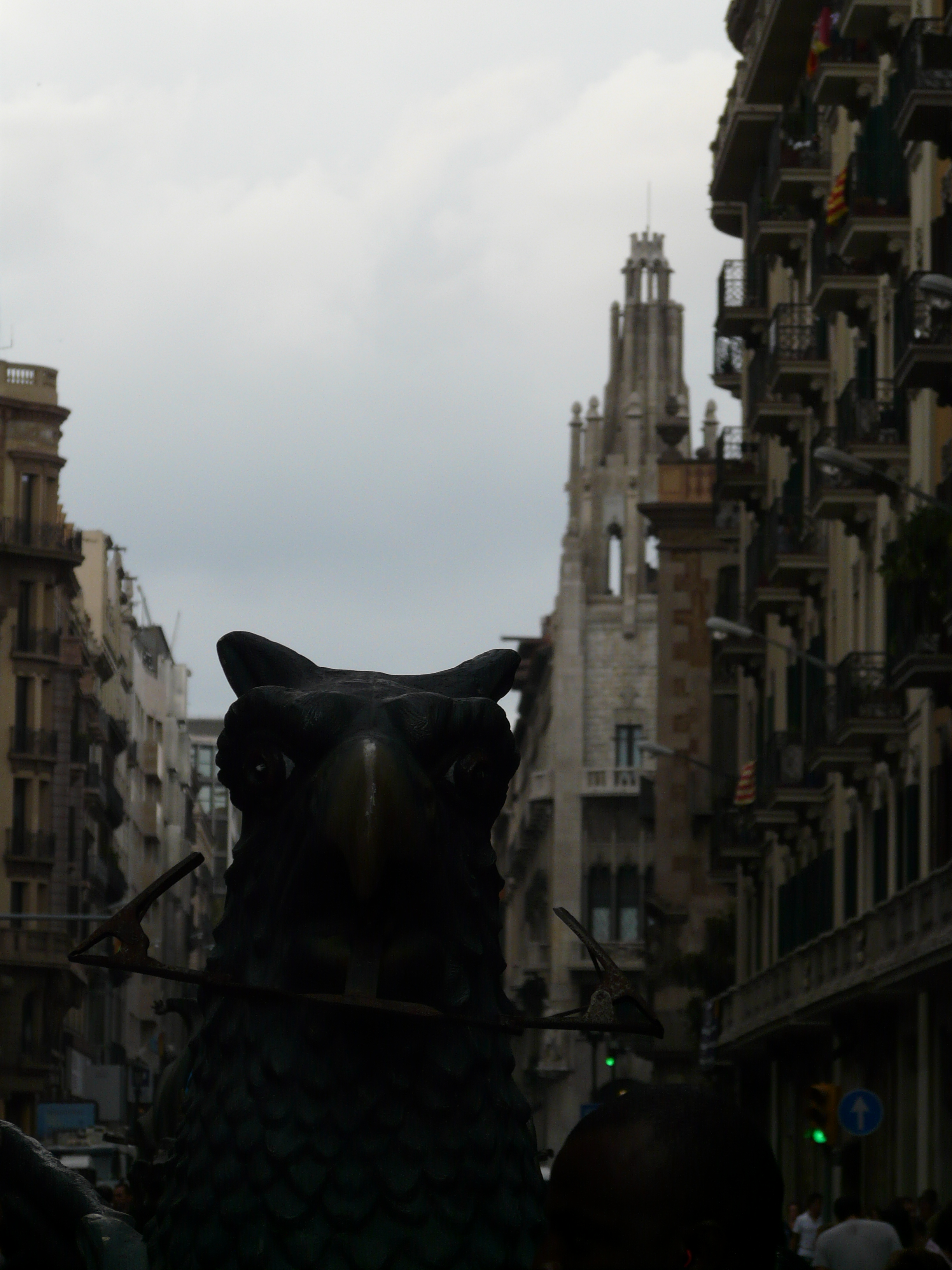 Imatge presa durant la tarda del diumenge 23 de setembre a les festes de la Mercè del 2012